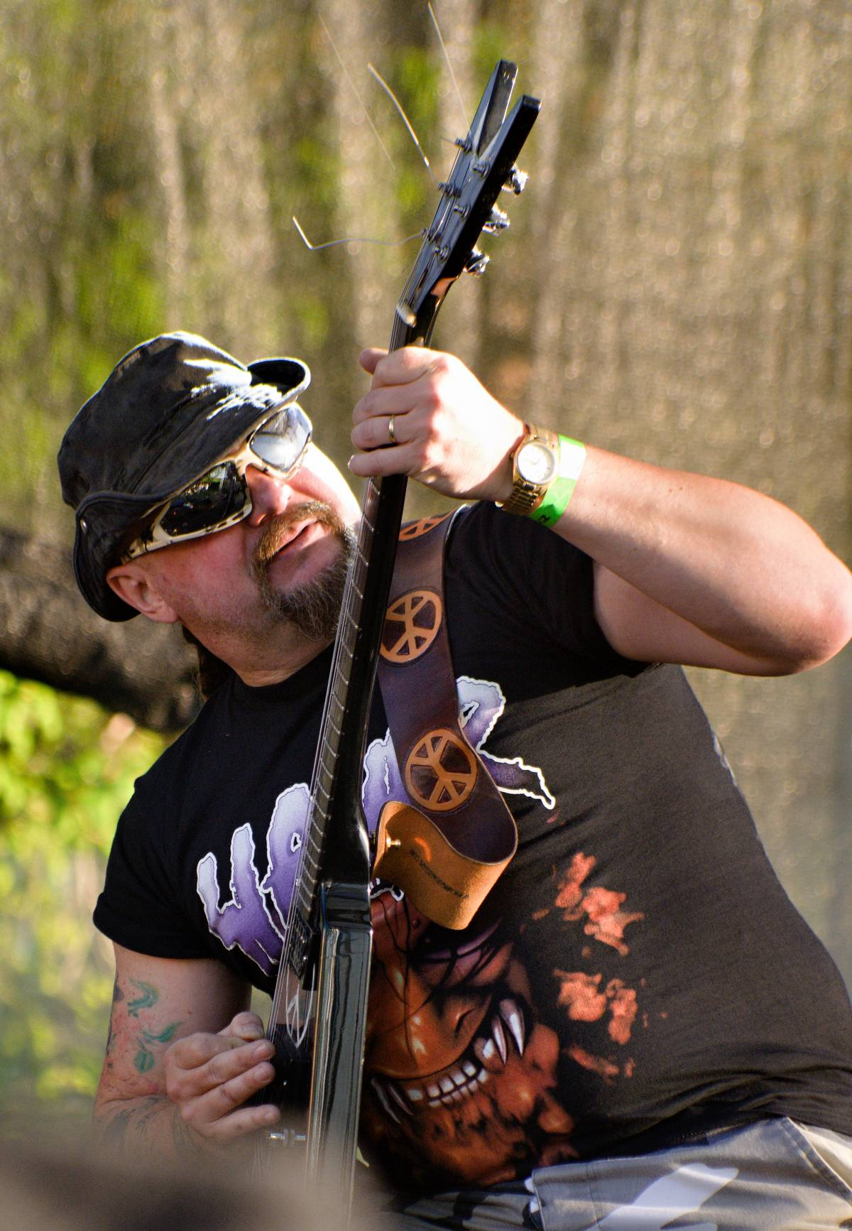 Miloš Dodo Doležal